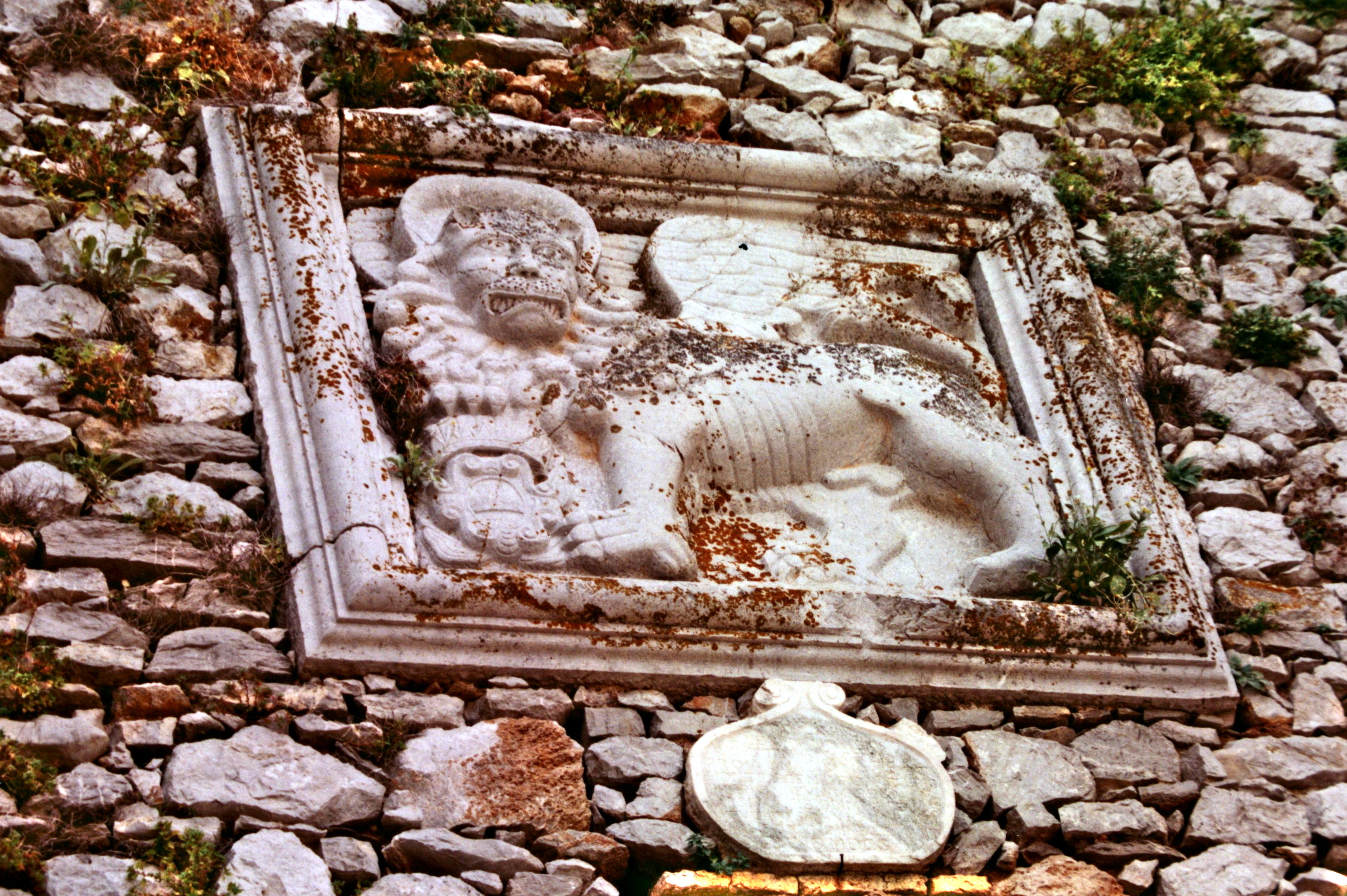 Φρούριο Παλαμηδίου«Παλαμήδι»